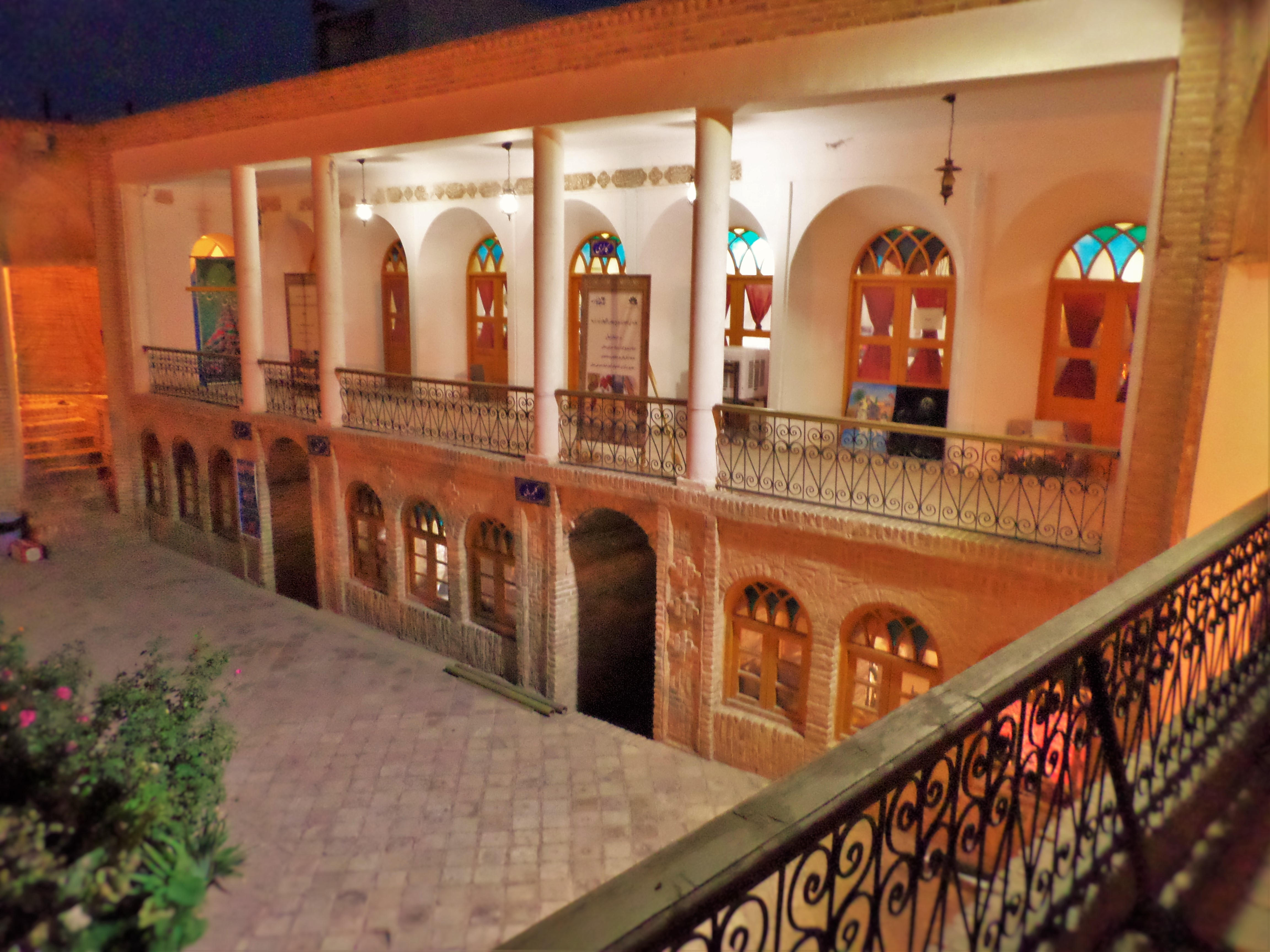 حسینیه جاجرمی های بجنورد